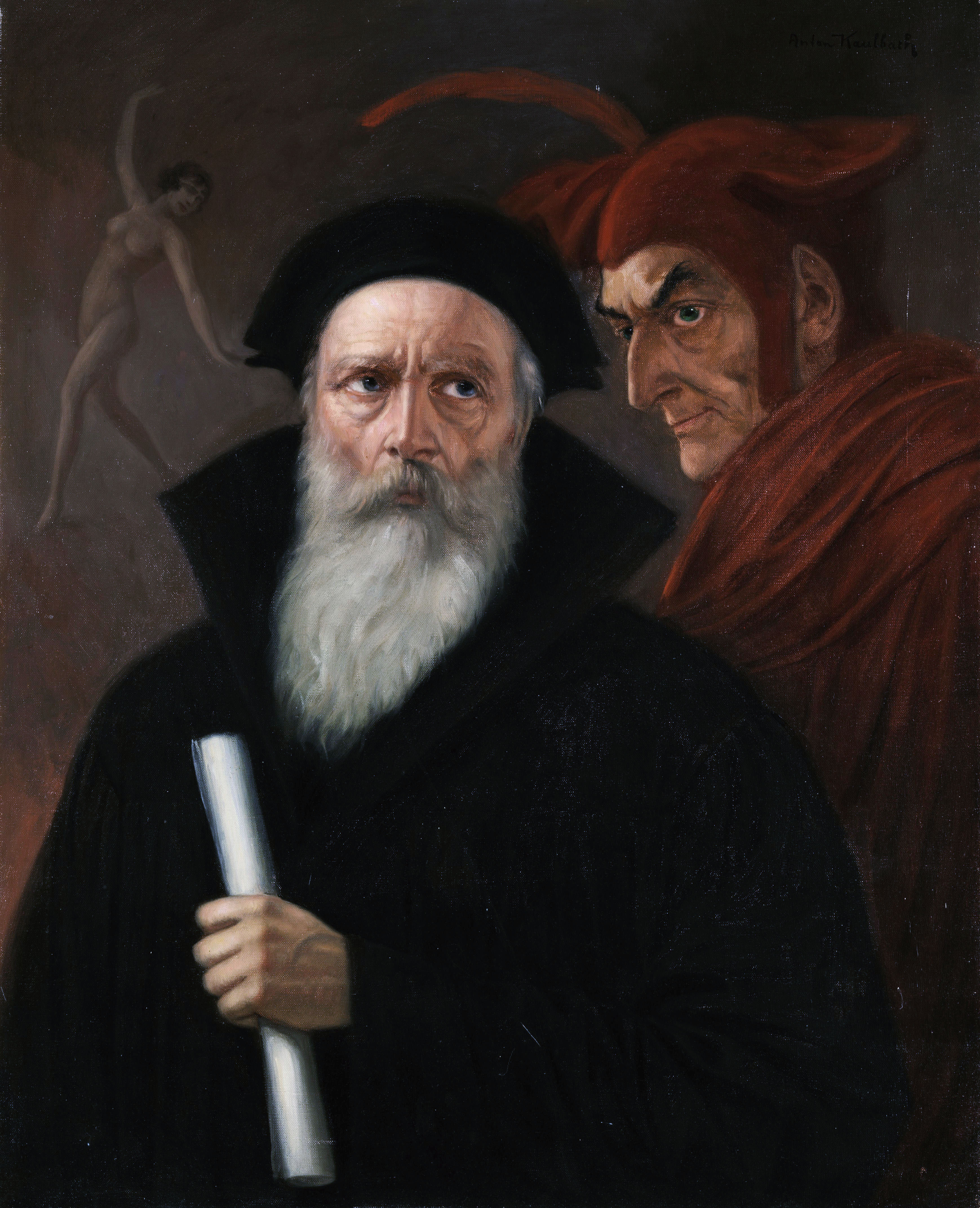 Faust und Mephisto. Öl auf Leinwand. 80 x 65 cm. Rechts oben signiert.